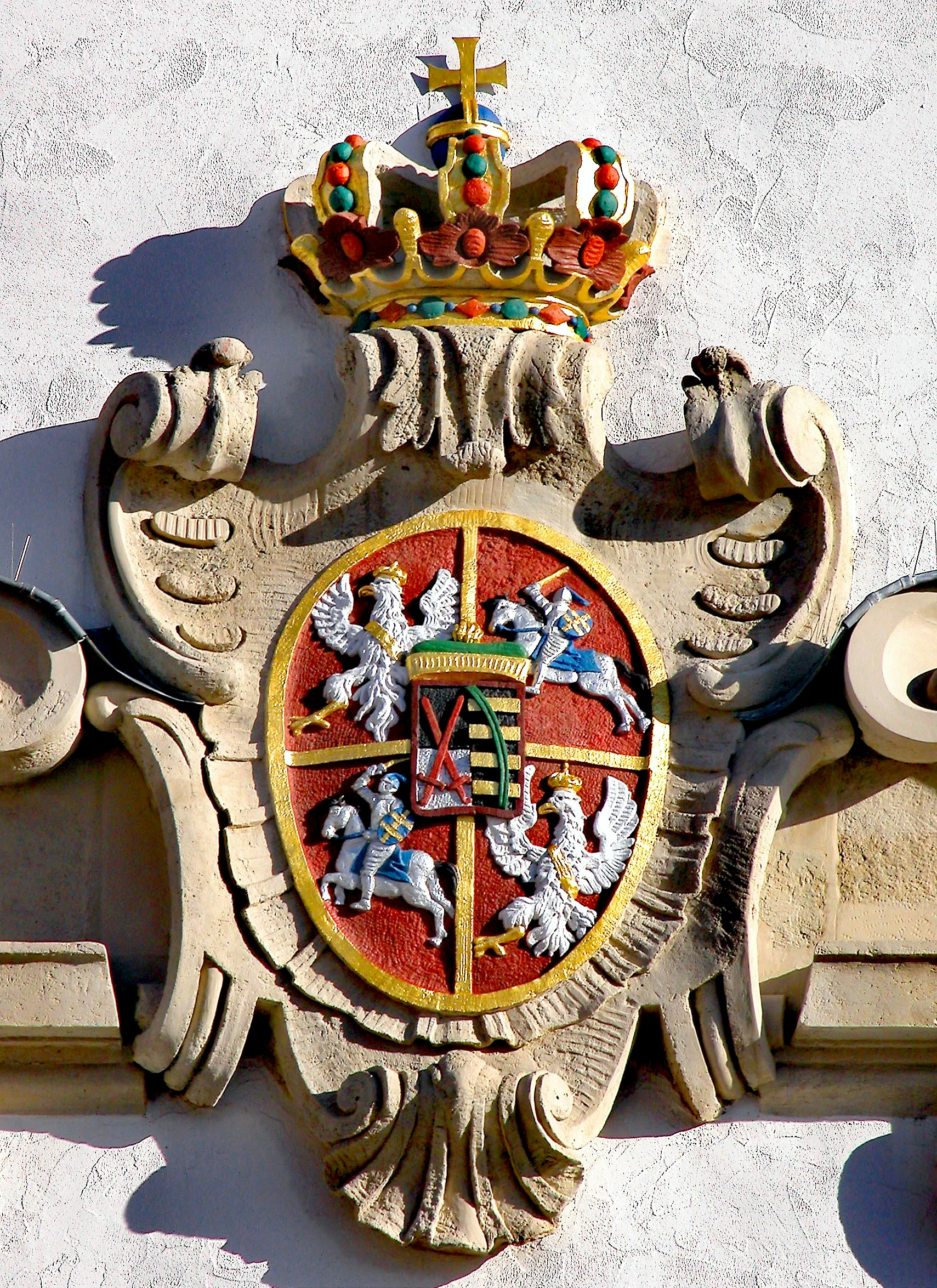 16.01.2005 01723 Wilsdruff: Sächsisch-Polnisches Wappen (1755) in der Supraporte am barocken Rathaus (1. Hälfte 18. Jh.) [DSCN5789.TIF]20050116190DR.JPG(c)Blobelt